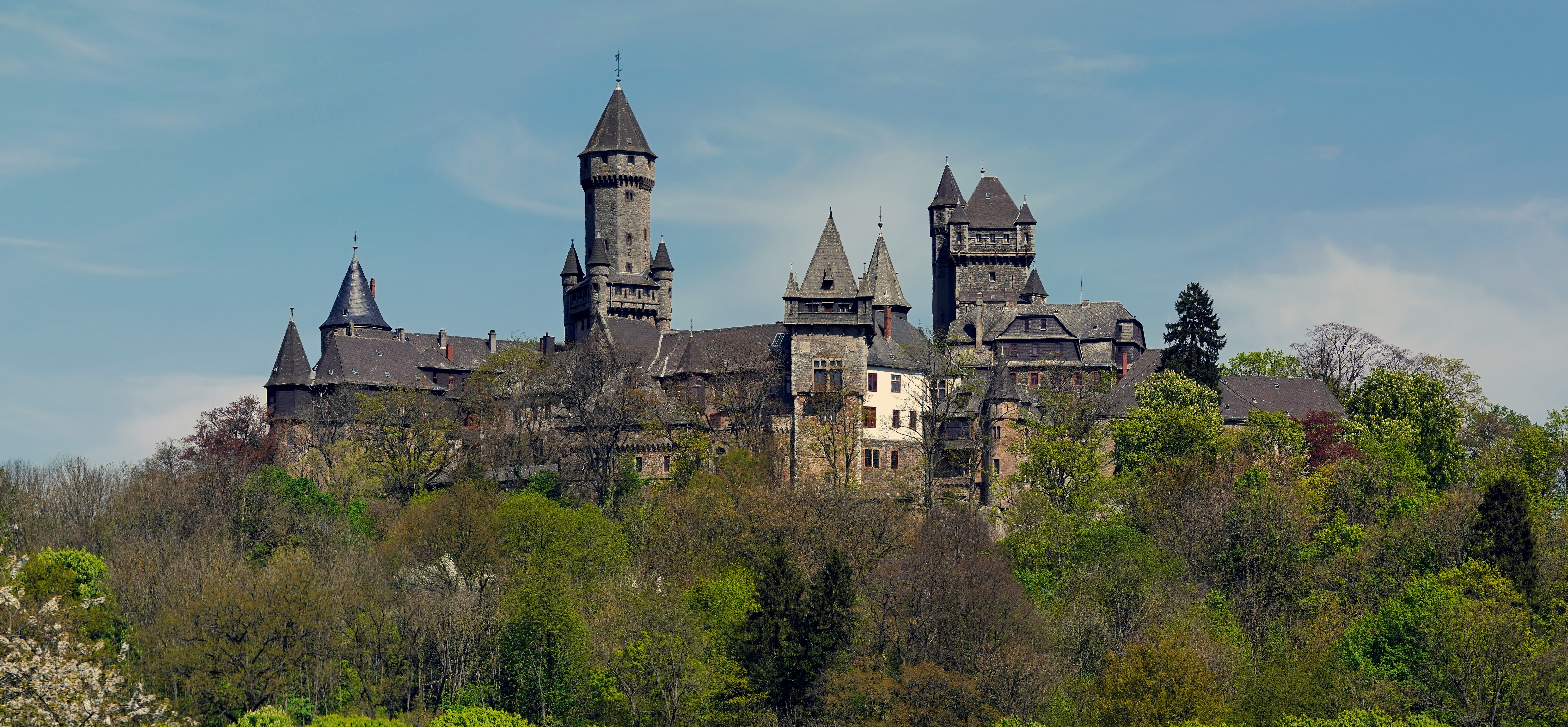 Das Schloss Braunfels liegt westlich des Luftkurortes Braunfels auf einer Basaltkuppe im mittelhessischen Lahn-Dill-Kreis. Es ist seit dem 13. Jahrhundert Sitz der Grafen von Solms und befindet sich auch heute noch im Familienbesitz der Grafen von Oppersdorff-Solms-Braunfels. This image was created with Hugin.